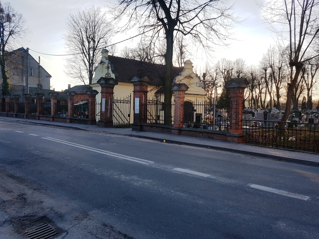 Cmentarz ul. Olsztyńska w Braniewie